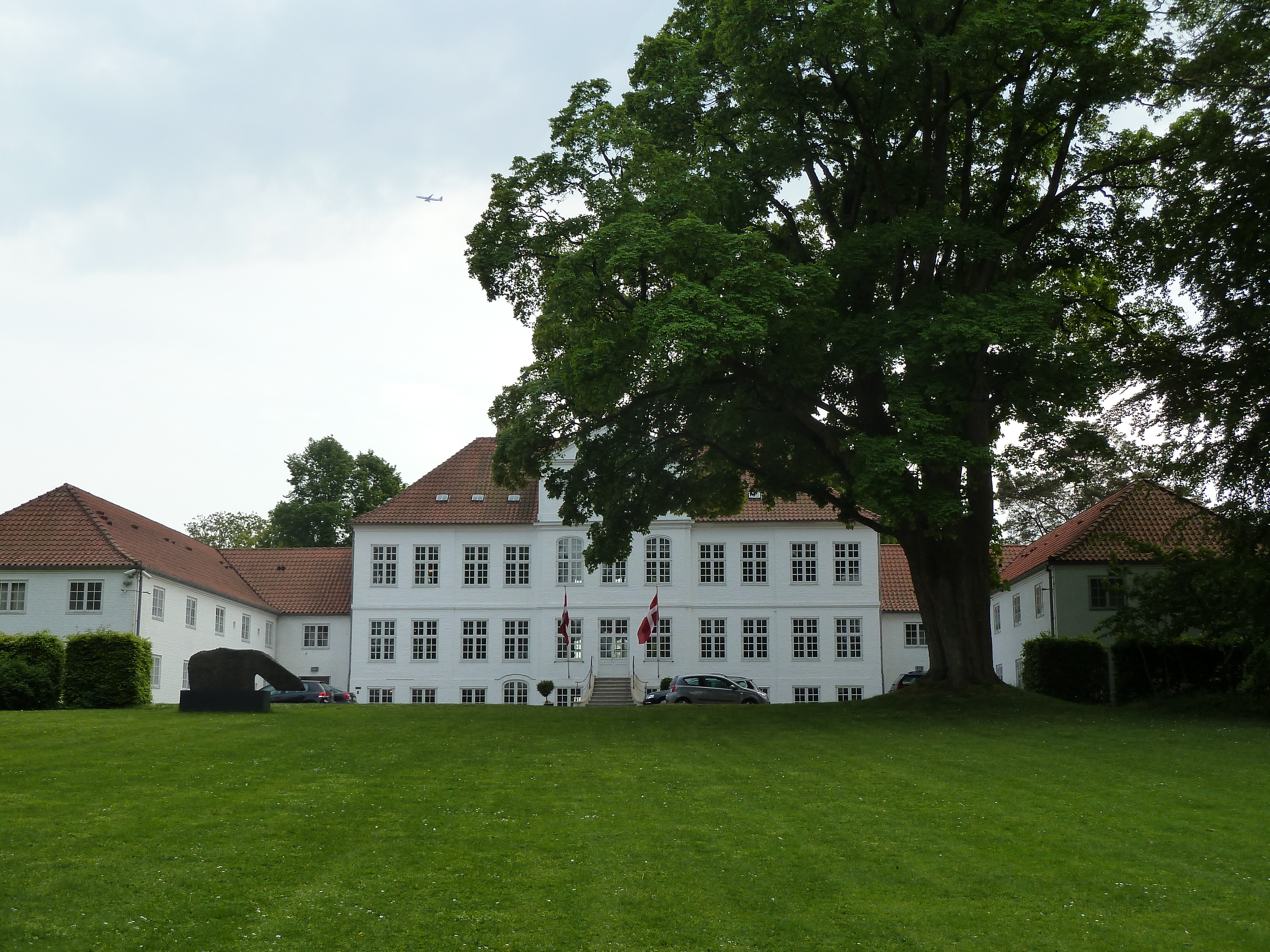 Schæffergårdens hovedbygning sett fra Hollenderdammen